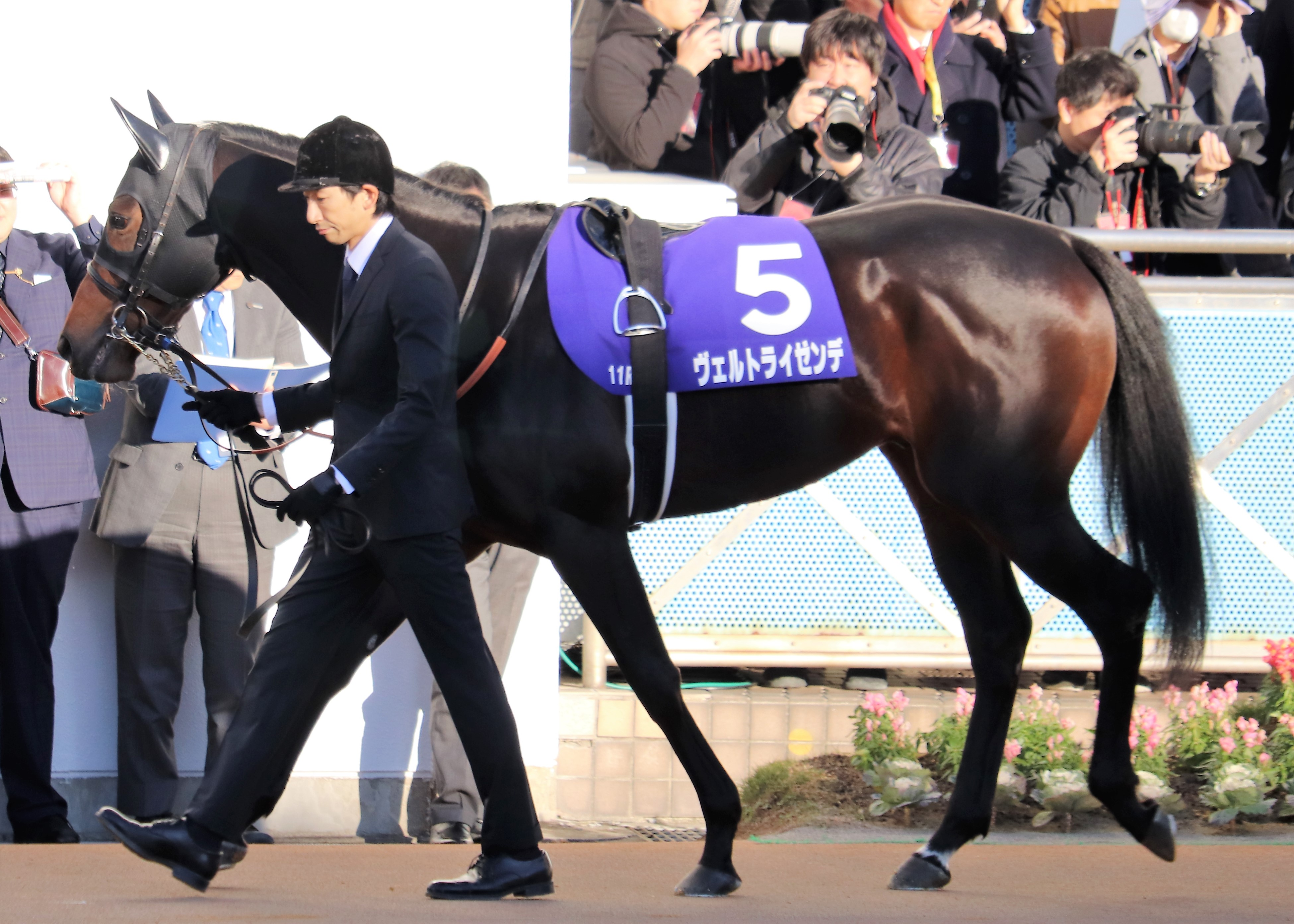 2019年のホープフルステークス、パドックのヴェルトラゼンデ